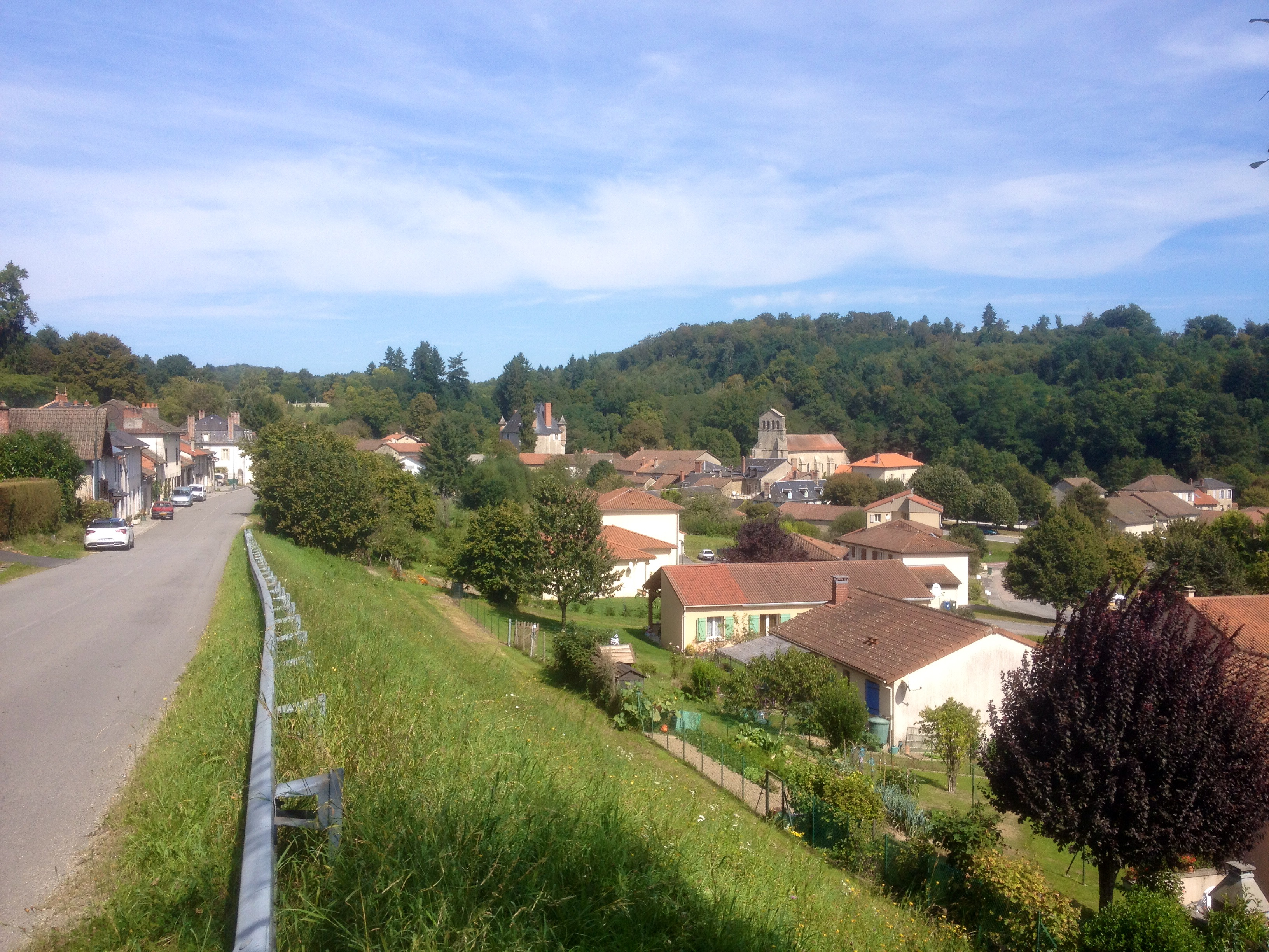 Le bourg d'Eyjeaux